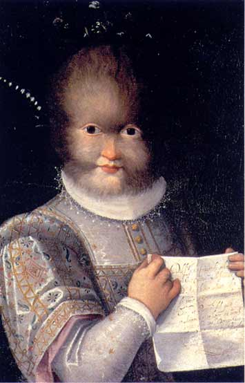 Portrait of Tognina Gonsalvus (b. 1580) Portrait d’Antonietta Gonsalvus peint en 1585 par Lavinia Fontana, Musée de Blois.